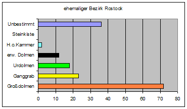 Rostock